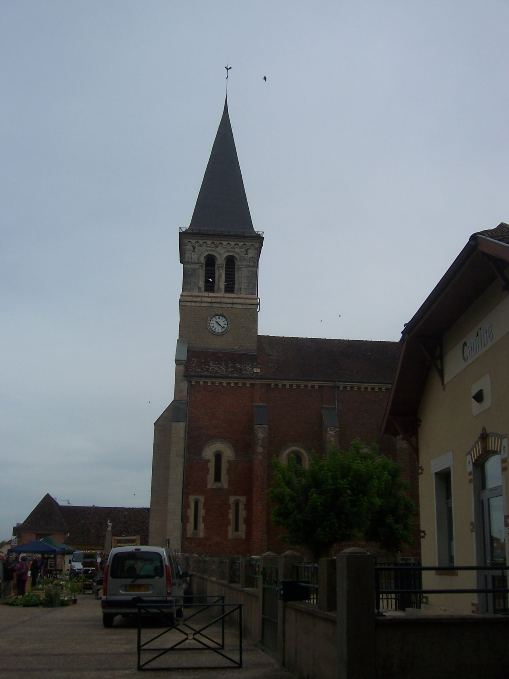 Eglise de Simard